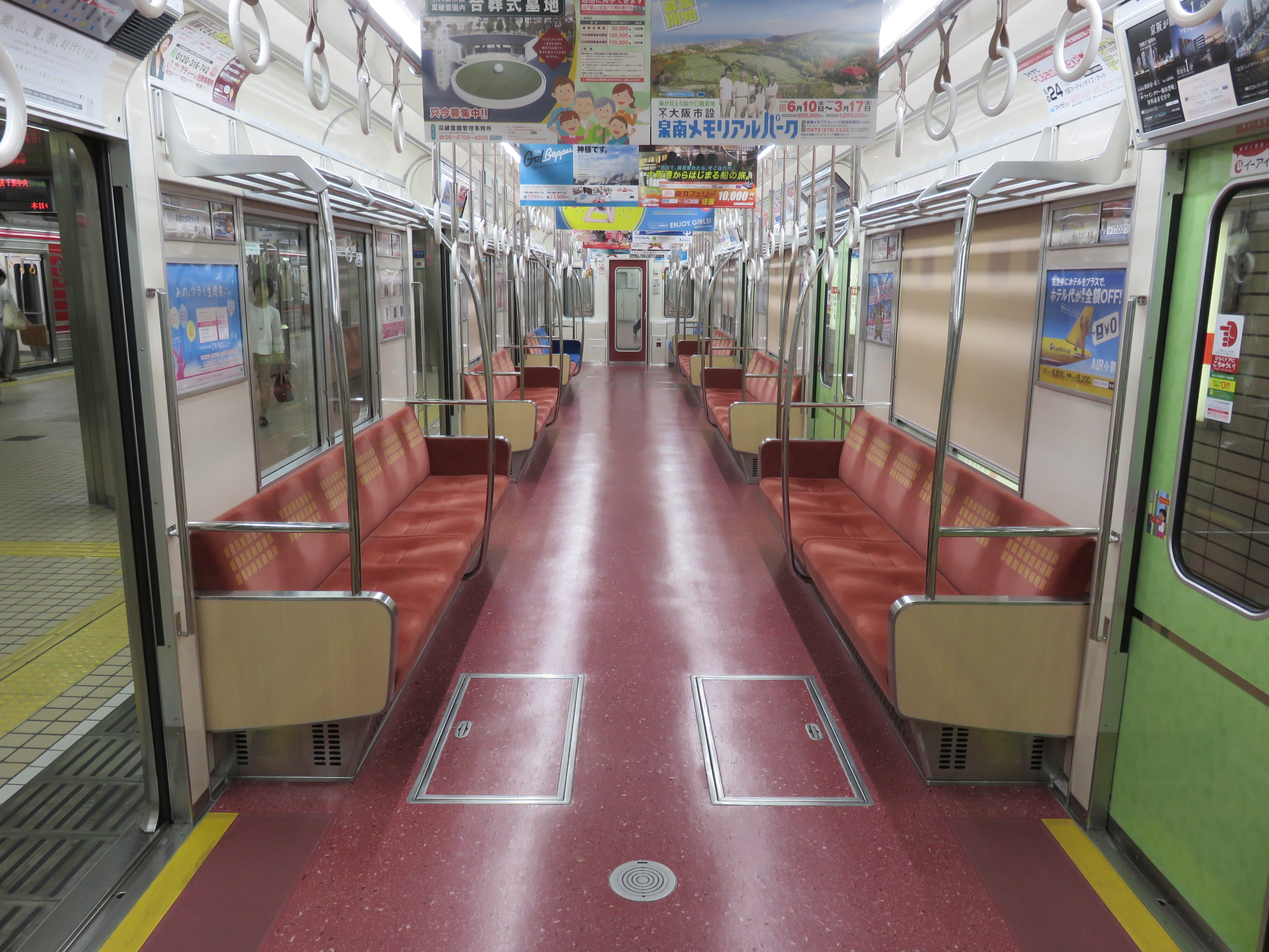 新デザインが採用された御堂筋線21系21004F車内